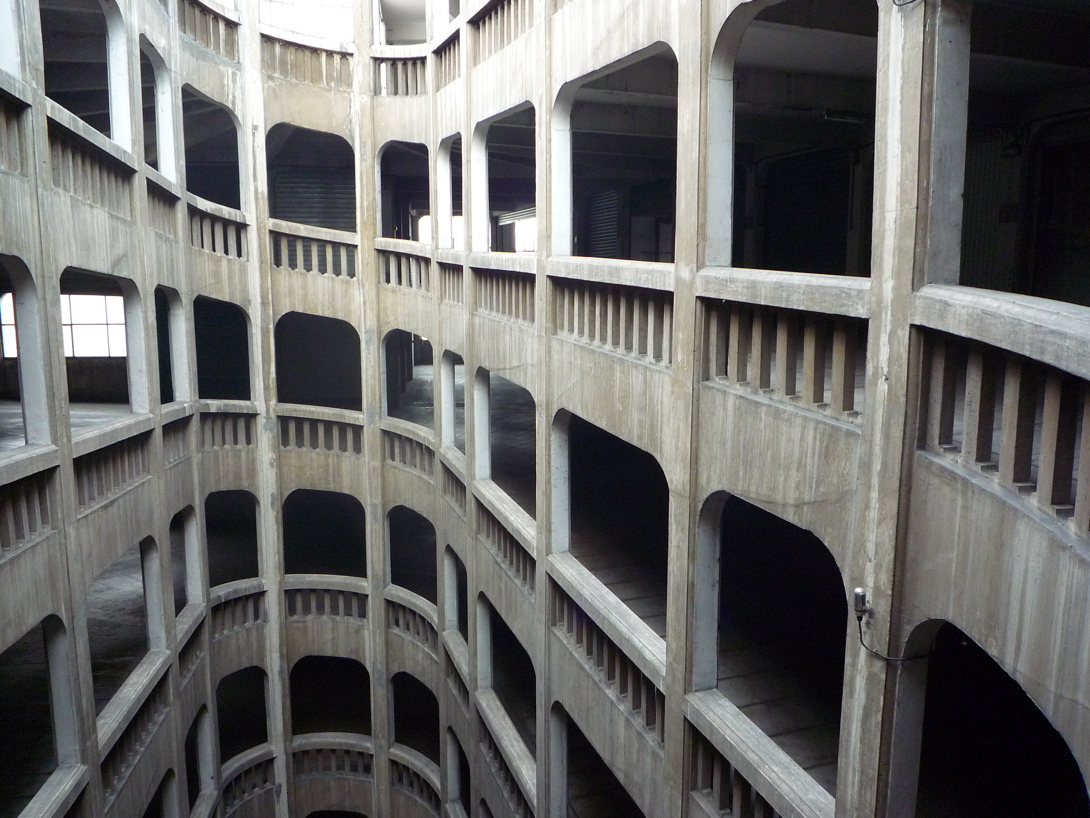 Garage hélicoïdal de Grenoble, (rue Bressieux)